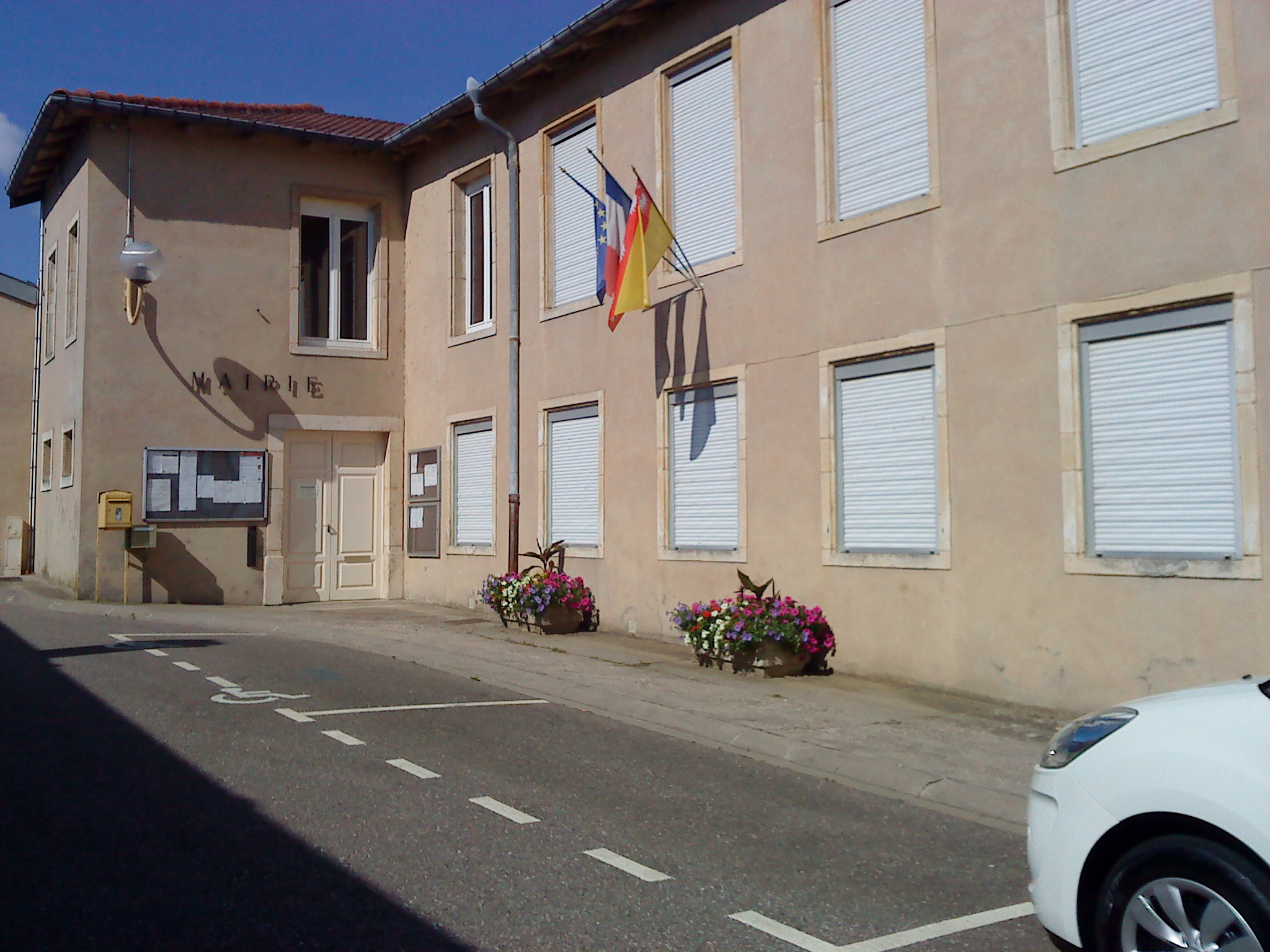 La mairie de Manoncourt-en-Vermois, commune du département de la Meurthe-et-Moselle et la région Lorraine.